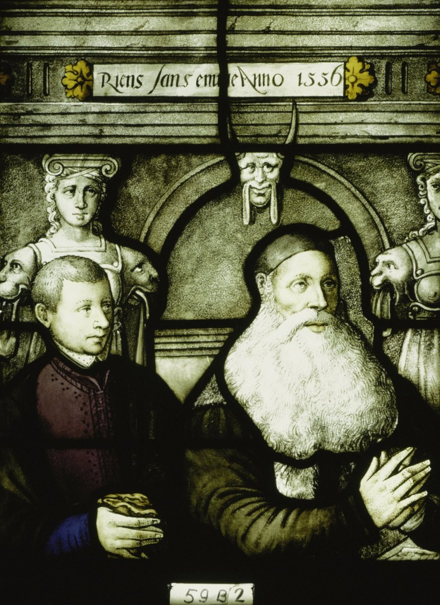 Sint Janskerk: interieur, glas in loodraam NR. 59, detail B 2